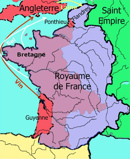 Carte de France au début de la guerre de cent ans